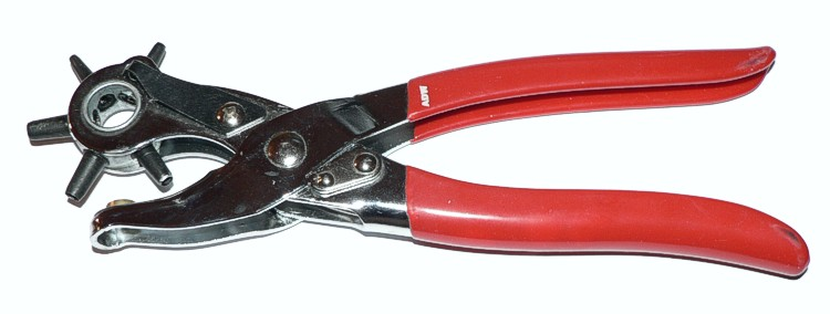 plier